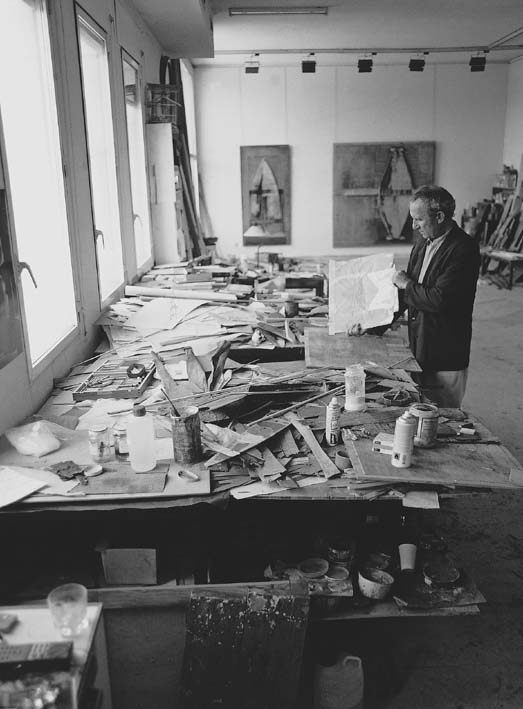 Lucio Muñoz en su estudio, años 90